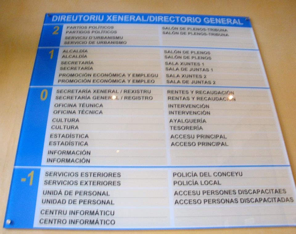 Rótulu del Ayuntamientu de Samartín del Rei Aurelio